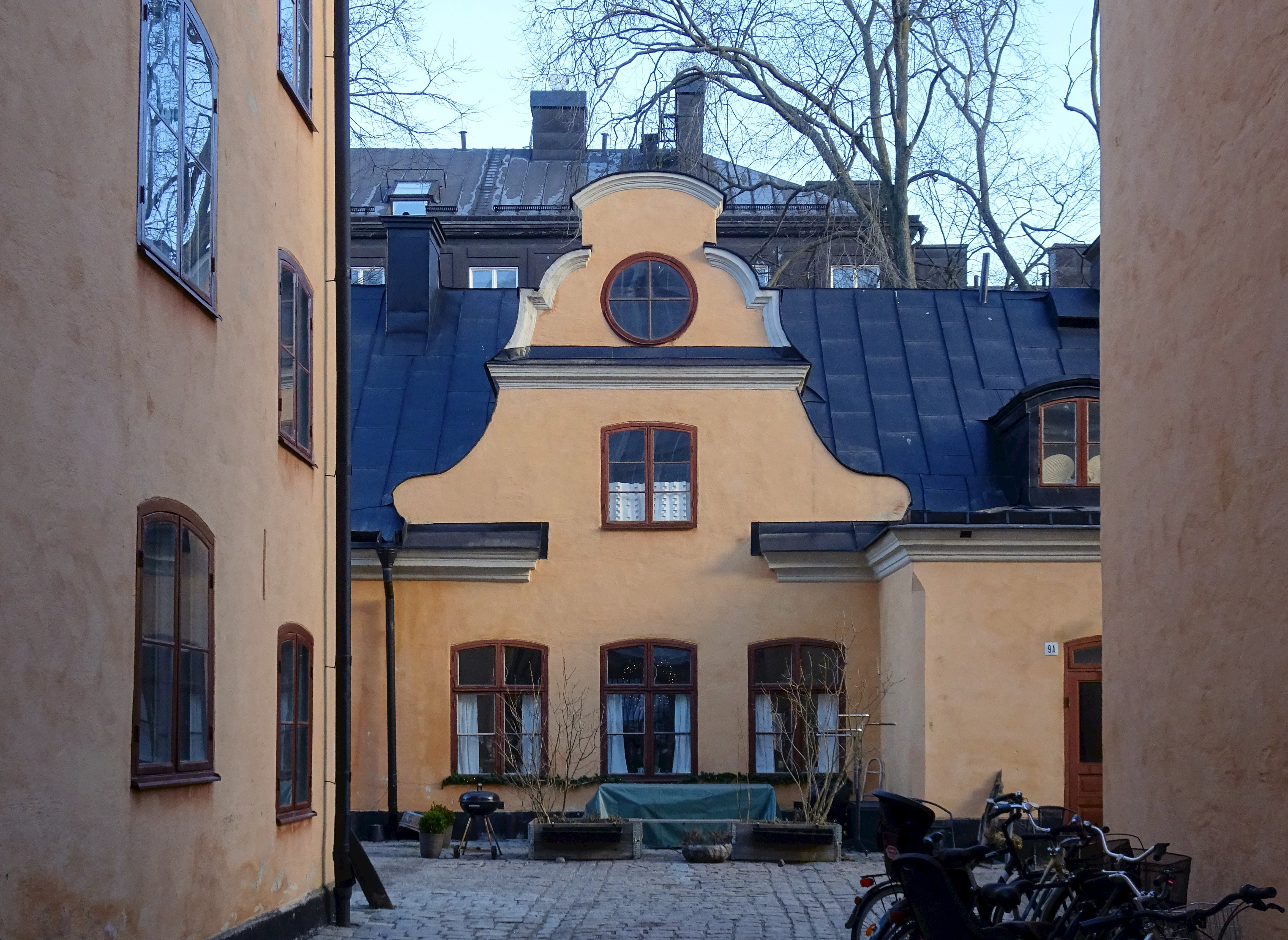 Kvarteret Tegen, f.d. Kronobränneri och Katarina sjukhus